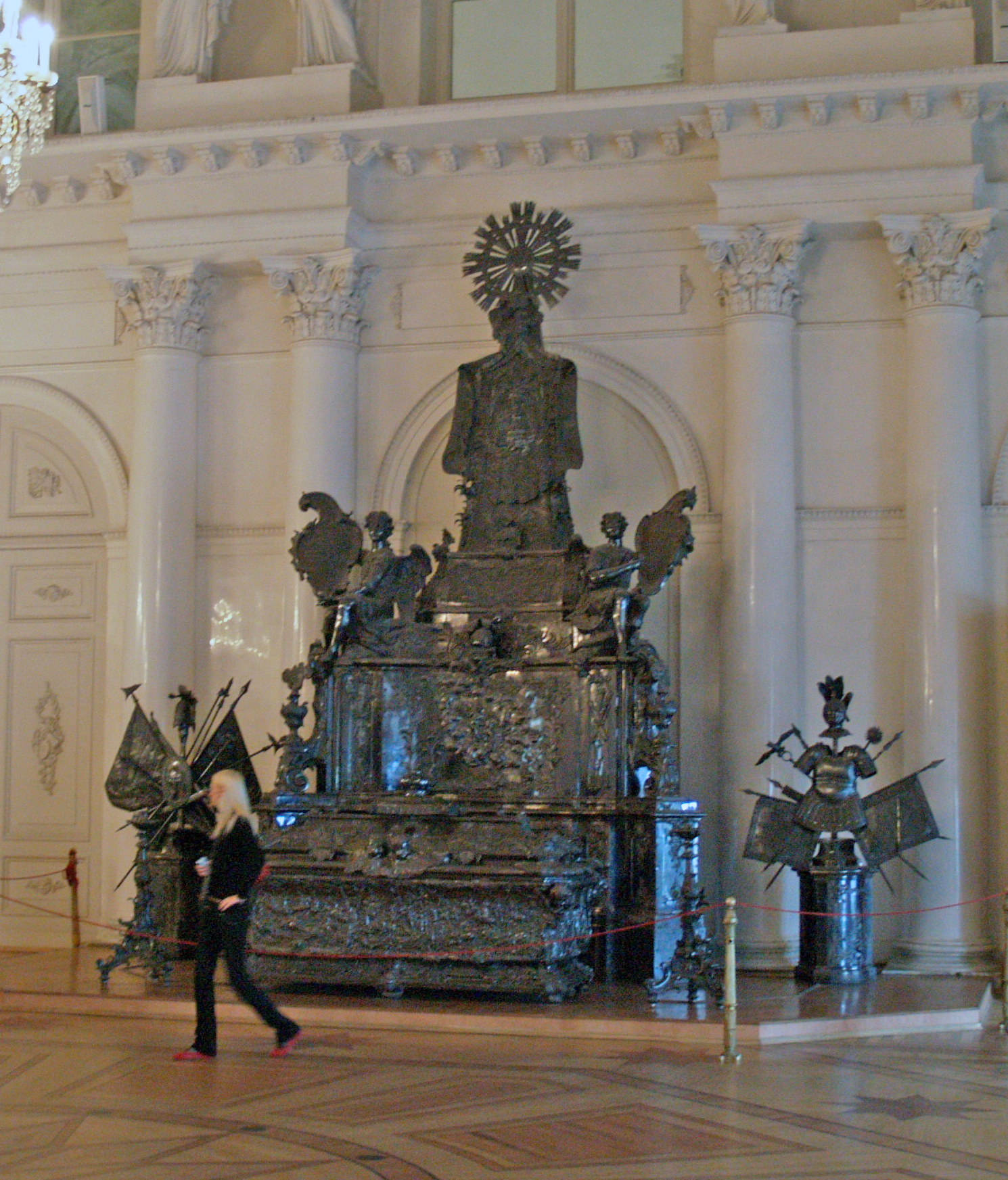 Серебряная рака Александра Невского, Эрмитаж